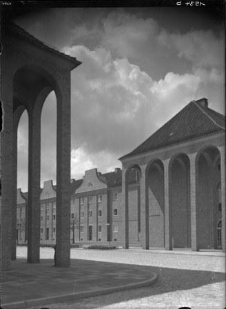 Städtische Lichtbildstelle Potsdam, Schillerplatz, 1937, Gelatinetrockenplatte, Potsdam Museum - Forum für Kunst und Geschichte